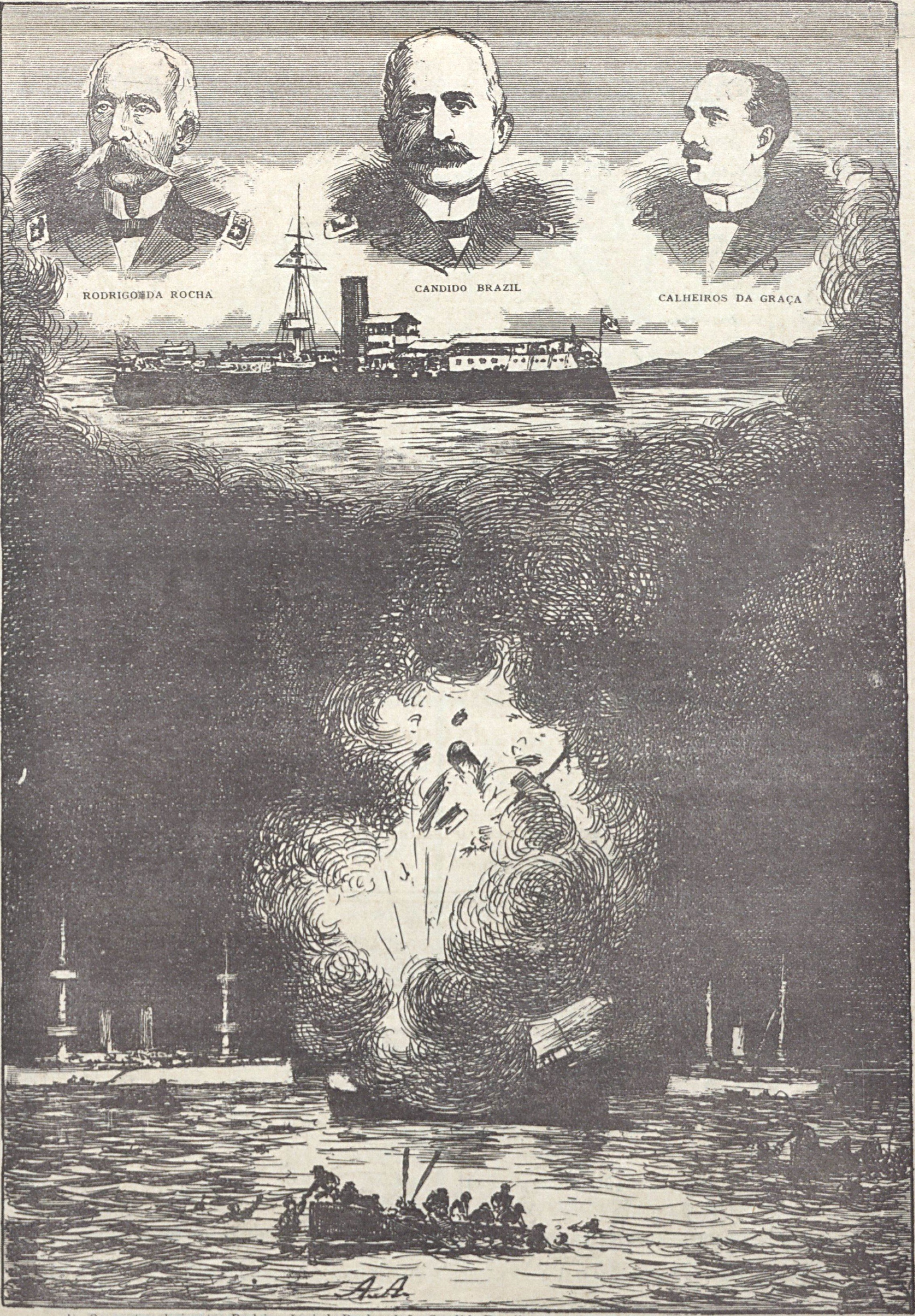 A catástrofe da noite de 21 de janeiro de 1906, na Baía de Jacuecanga: explosão e submersão do Aquidabã, à vista dos cruzadores Barroso e Tiradentes.